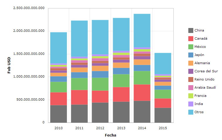 Importaciones de Estados Unidos del periodo 2010-hasta agosto 2015 expresadas en USD valor FOB.